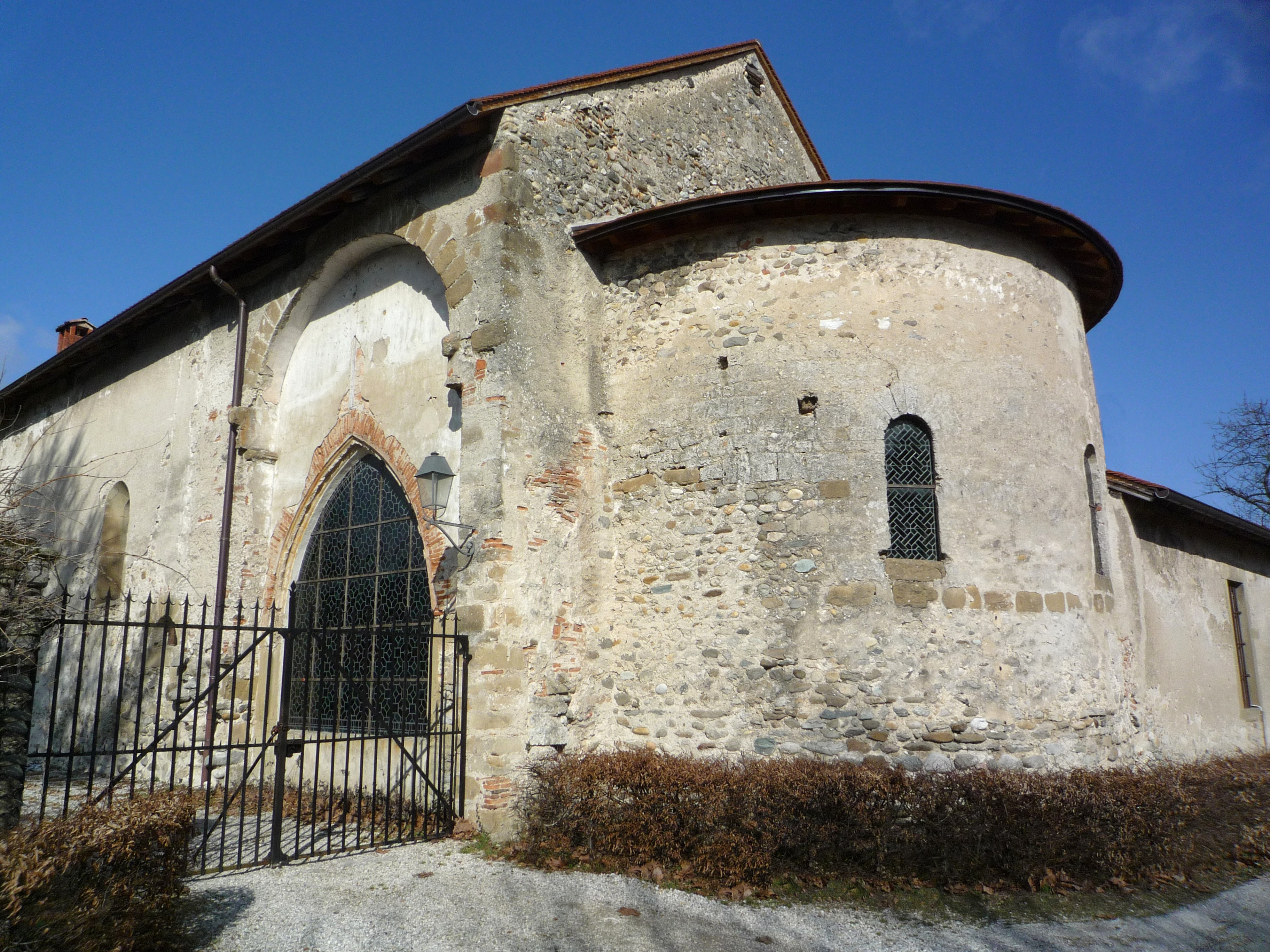 Le Prieuré de Chirens Chirens, Isère, France Mars 2012